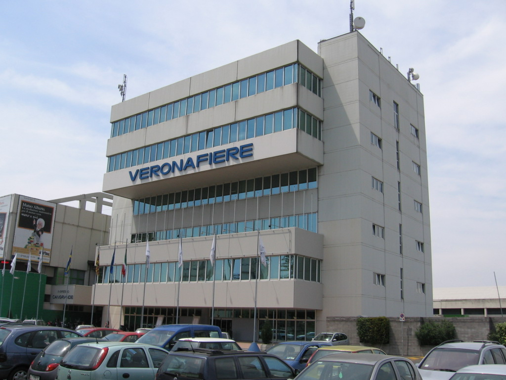 La fiera di Verona